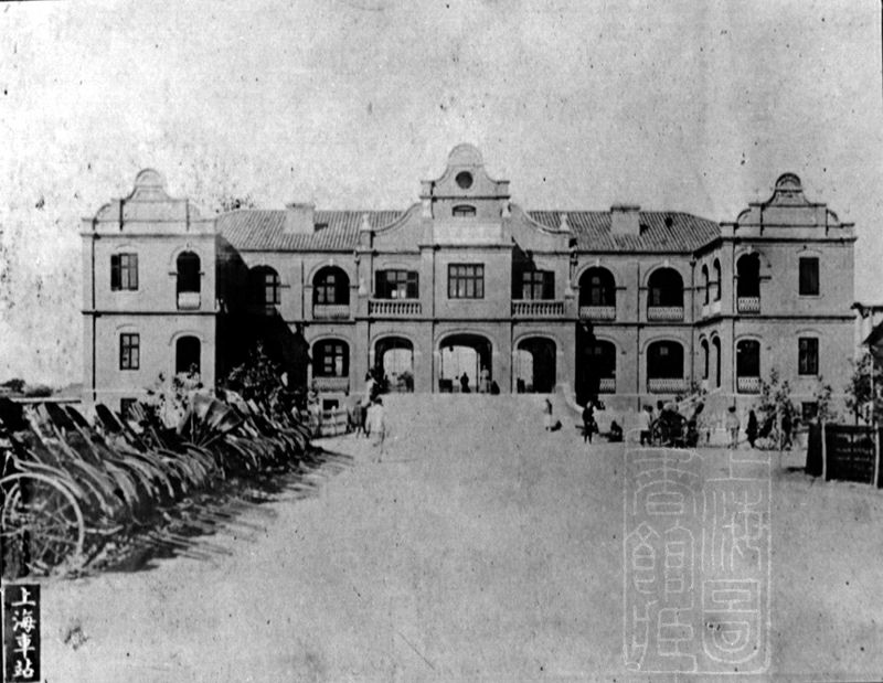 旧上海南站（1910年），上海图书馆档案。